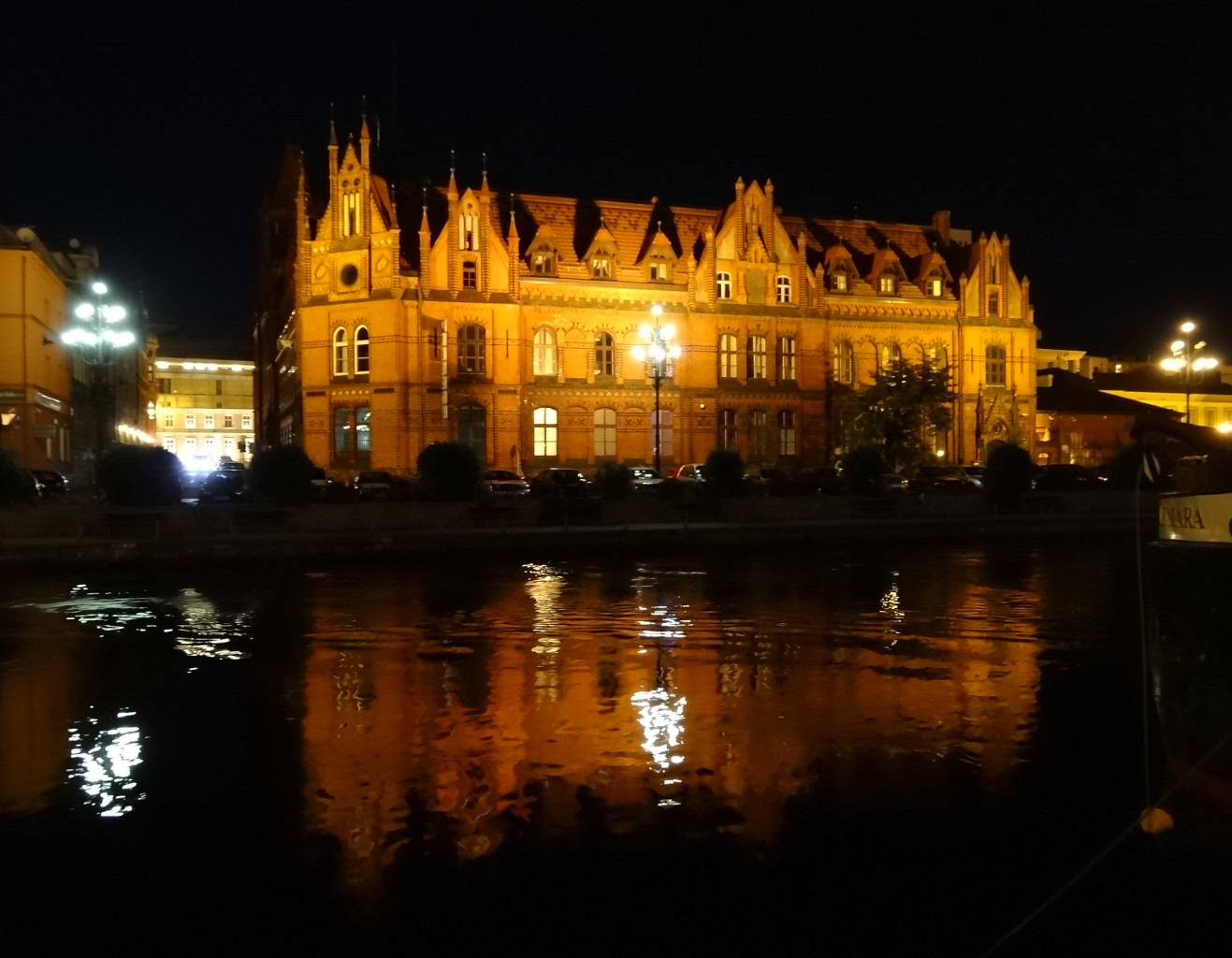 Budynek Poczty Głównej w Bydgoszczy przy ul. Jagiellońskiej (zbud. 1883 skrzydło płd, 1899 skrzydło płn)